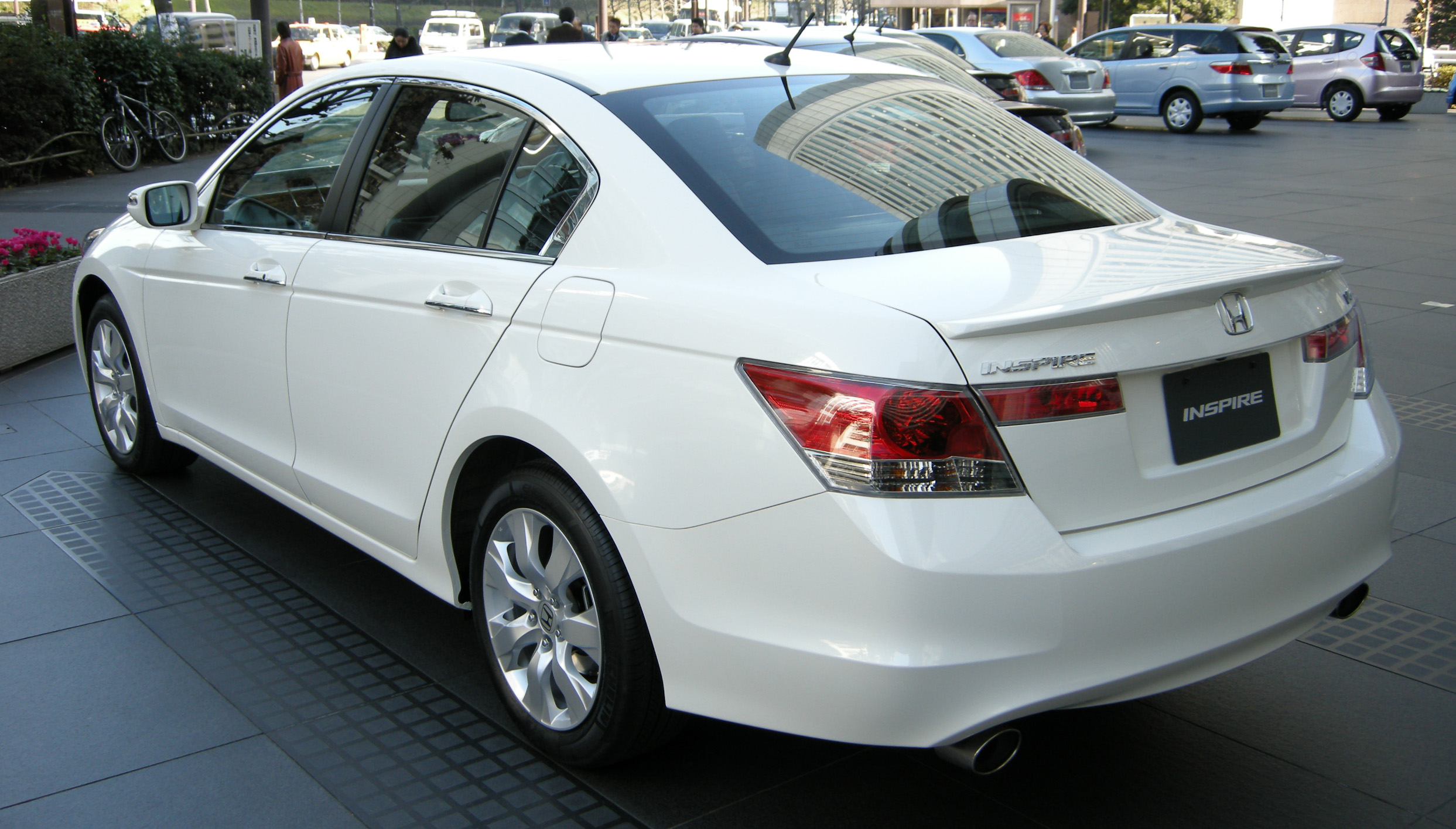 2008 Honda Inspire in Honda Welcome Plaza Aoyama (Minato, Tokyo)